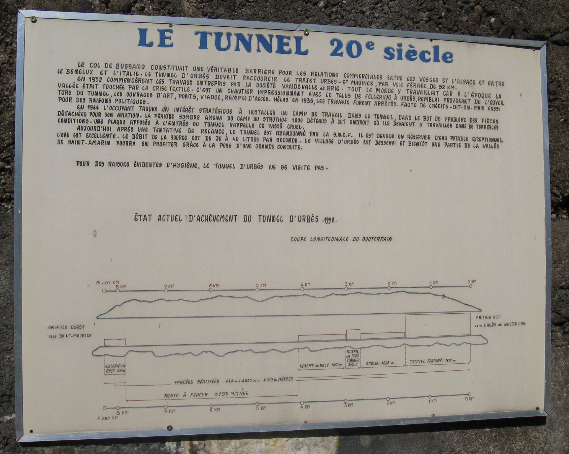 Beschreibung Urbes Tunnel